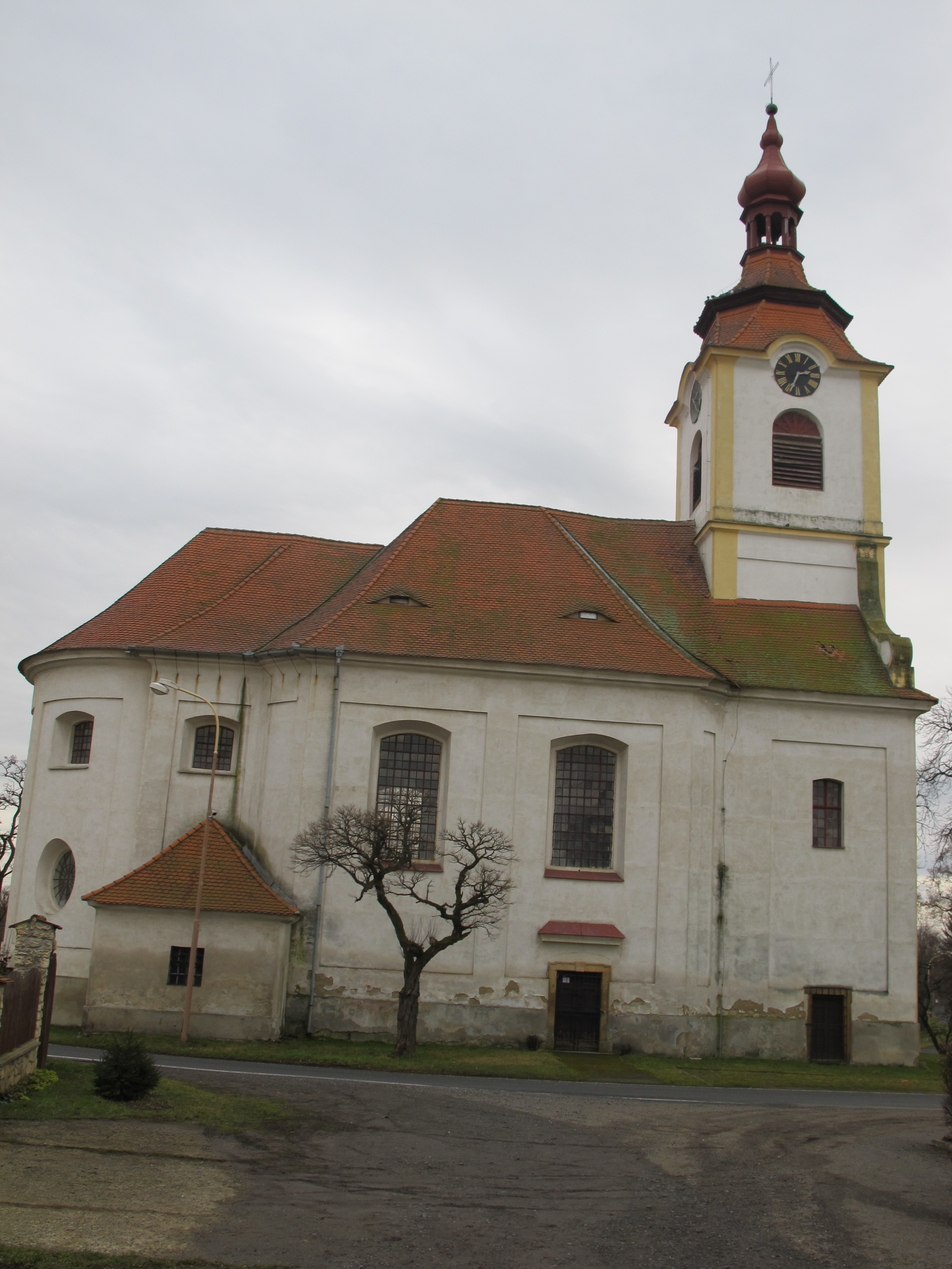 Kostel sv. Prokopa v obci Blažim - celkový pohled od severu